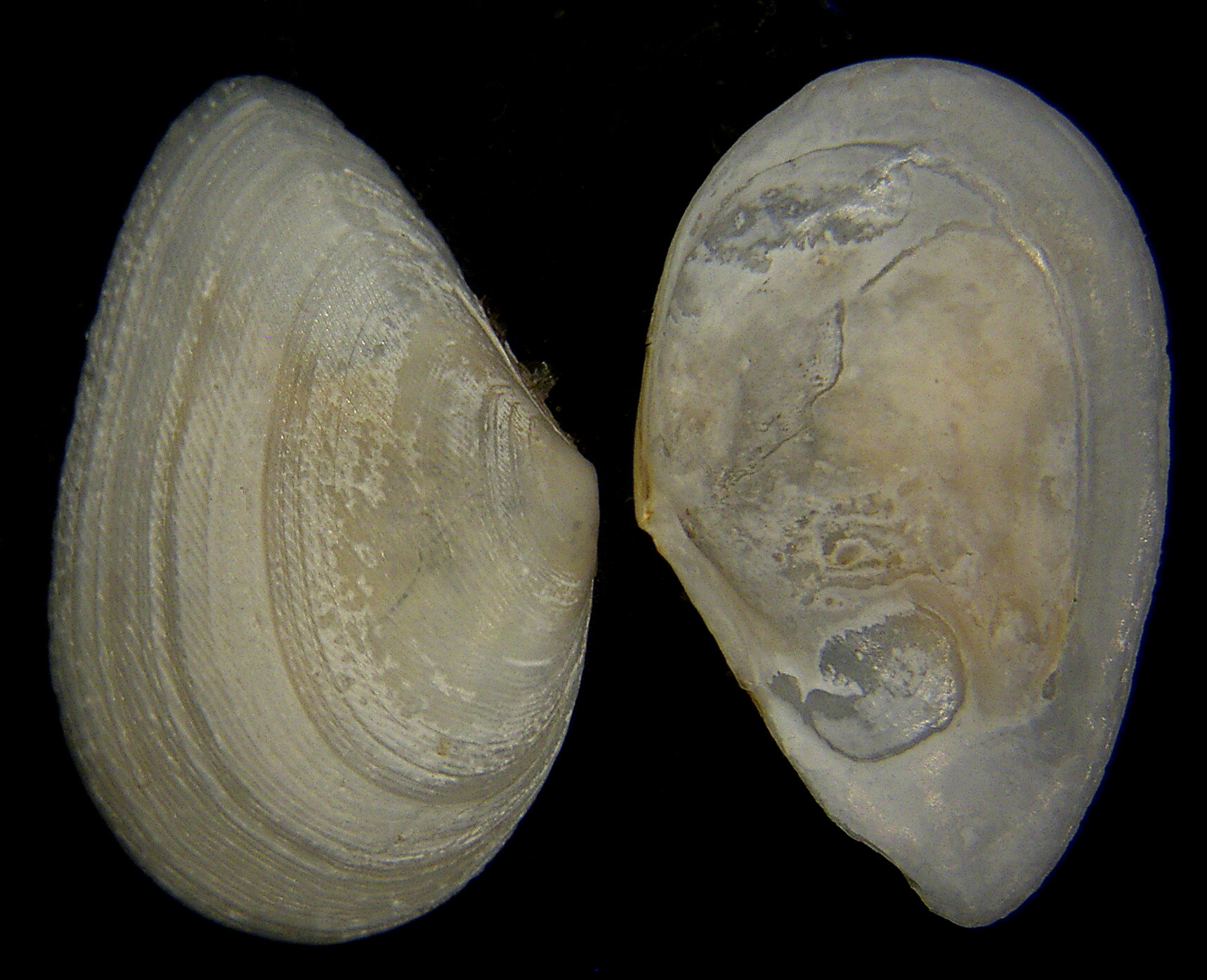 Familie: Tellinidae Groesse: 20 mm Verbreitung: Norwegen bis Schwarzes Meer Photo: U.Schmidt, 2006